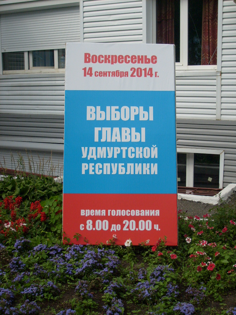 Информационный стенд во время избирательной кампании 2014